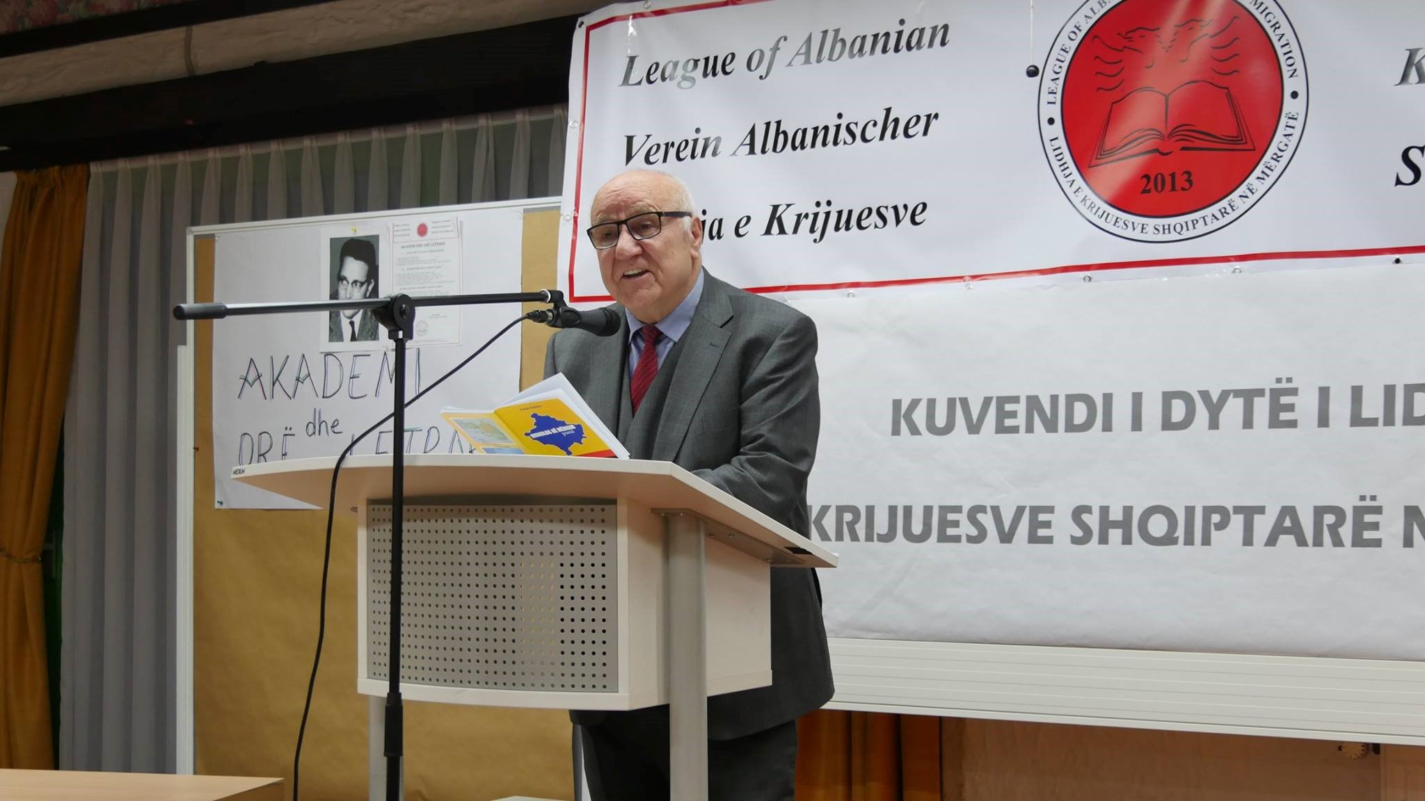 Kuvendi i Dyte, Lidhja e Krijuesve Shqipetar, Suedi